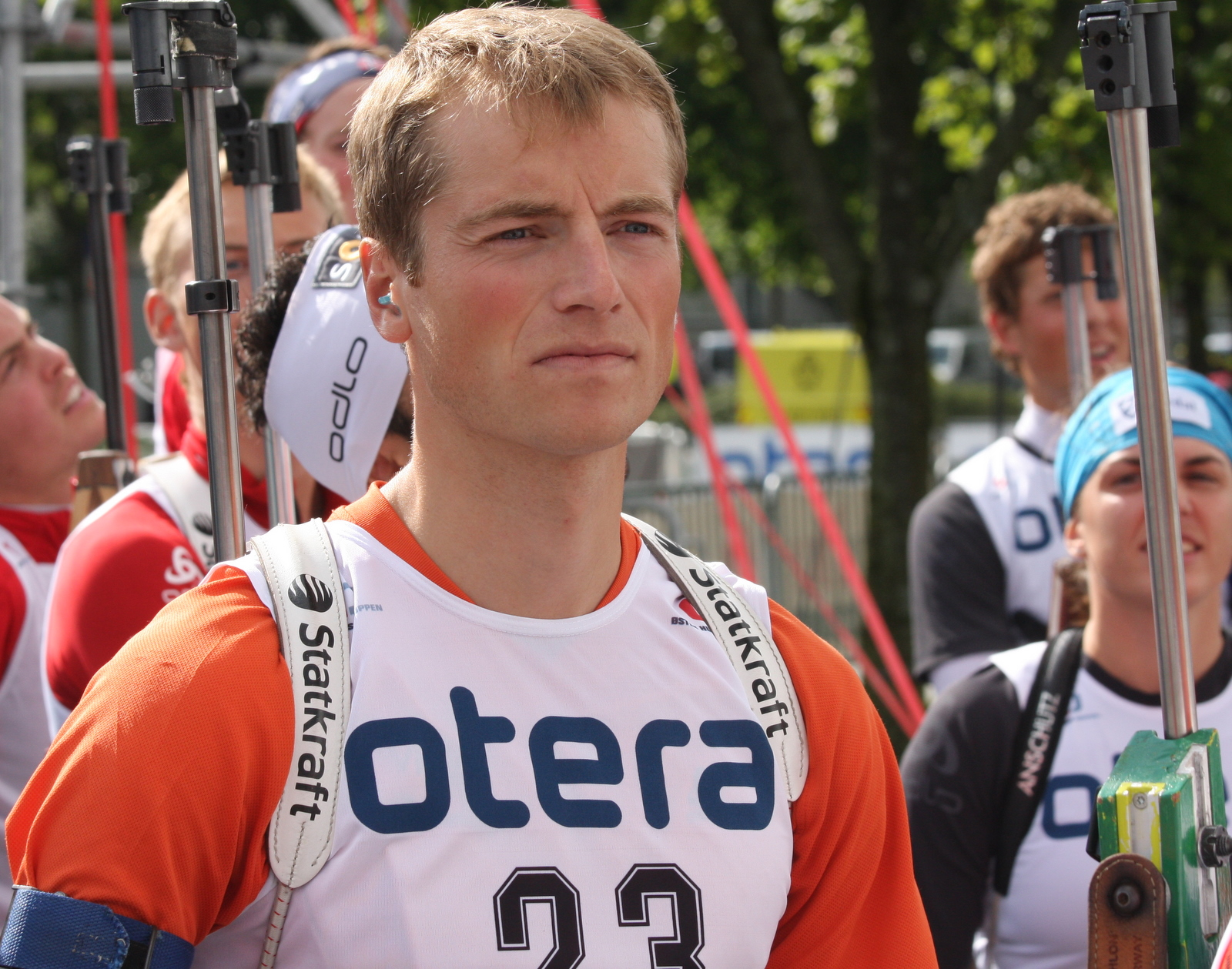 Alexander Os under Blinkfestivalen i Sandnes 2009